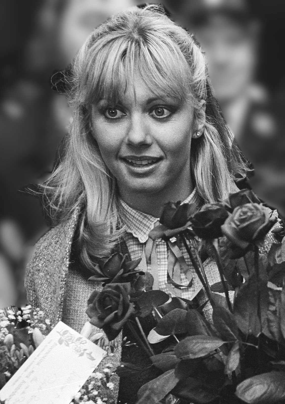 Collectie / Archief : Fotocollectie Anefo Reportage / Serie : [ onbekend ] Beschrijving : Aankomst zangeres Olivia Newton John op Schiphol; Olivia Newton John met bloemen Datum : 24 november 1978 Trefwoorden : BLOEMEN, aankomsten, zangeressen Persoonsnaam : Newton John, Olivia Fotograaf : Verhoeff, Bert / Anefo Auteursrechthebbende : Nationaal Archief Materiaalsoort : Negatief (zwart/wit) Nummer archiefinventaris : bekijk toegang 2.24.01.05 Bestanddeelnummer : 930-0131